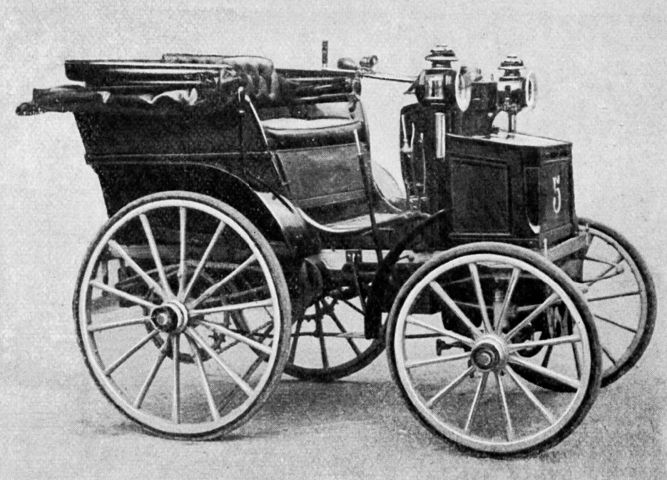 La Panhard & Levassor n°5 d'Émile Levassor et Charles d'Hostingue, victorieuse du Paris-Bordeaux-Paris 1895 - La Vie au Grand Air du 18 octobre 1913, p.859